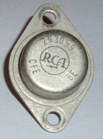 Ein 2N3055 von RCA, noch mit altem Logo